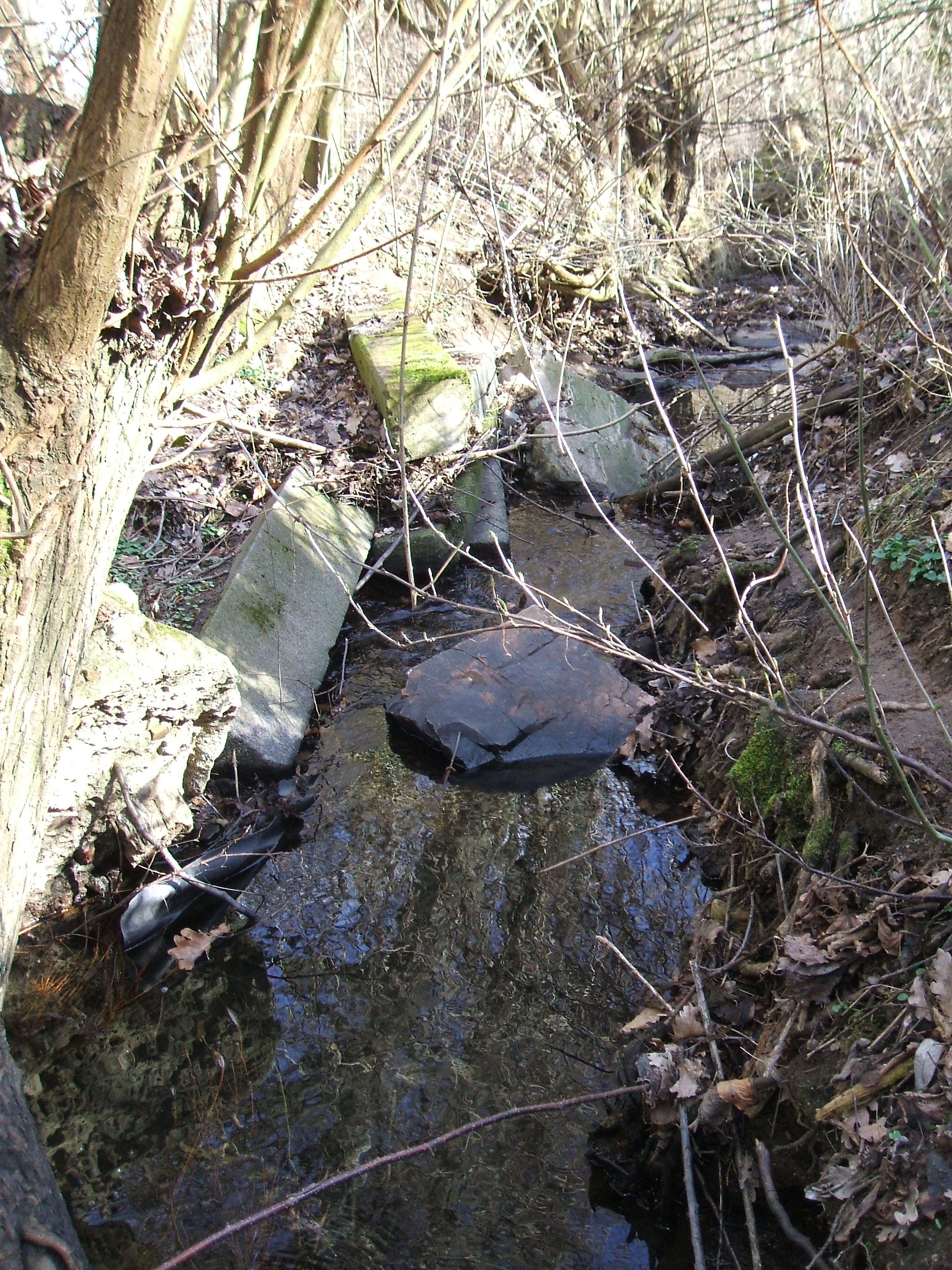 Bei km 4,3–4,4 finden sich am linken Ufer des Leihgrabens große bearbeitete Natursteinblöcke, wo einst die Schmelzmühle stand